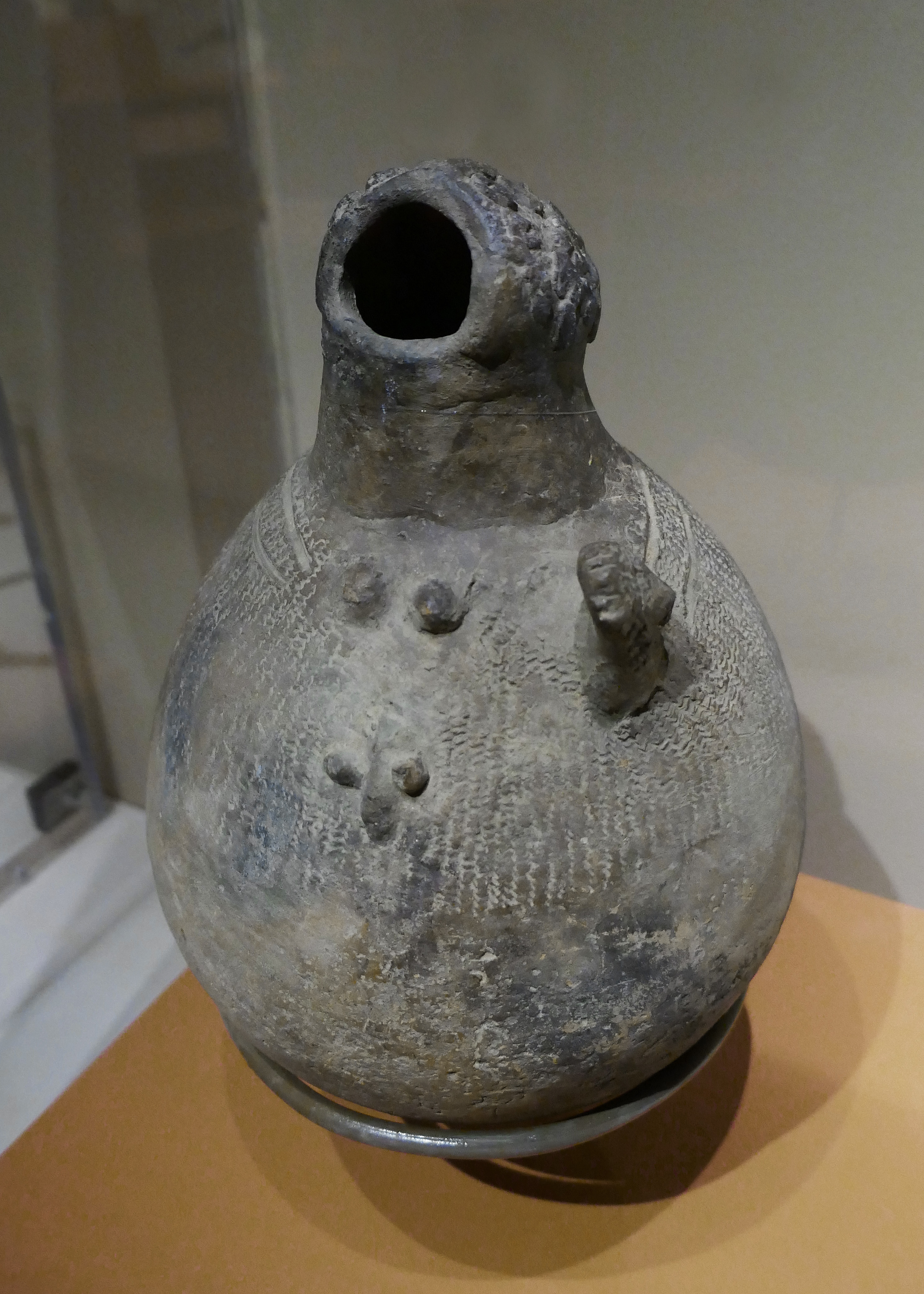 Poterie sacrée (zighilè) Artiste inconnu Population Mafa, Bulahay, Cameroun Milieu du 20e siècle Céramique Fowler Museum at UCLA Objet présenté lors de l'exposition Frapper le fer. L'art des forgerons africains au musée du quai Branly Jacques Chirac.